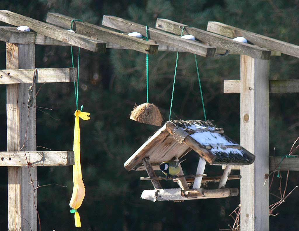 Karmniki: słonina, kokos i karmnik na ziarna